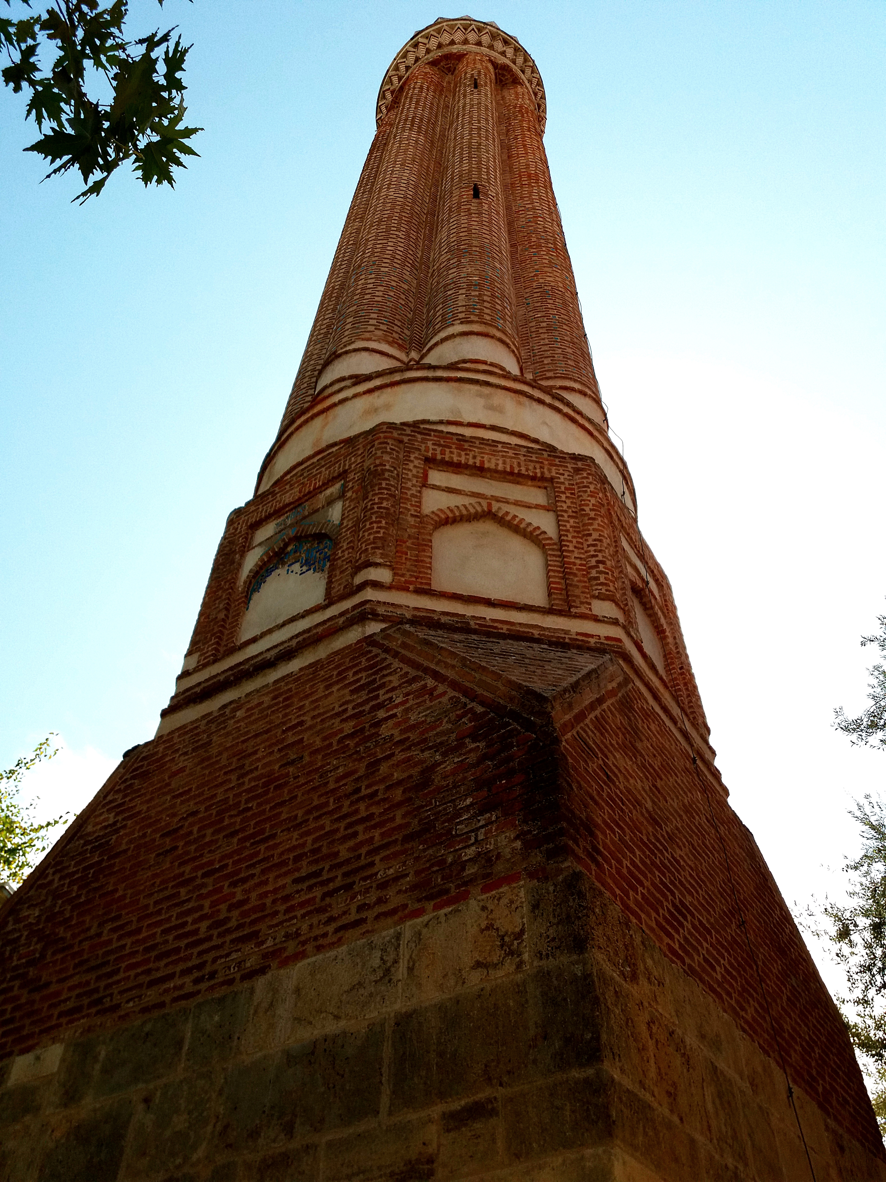 Yivli Minare. Antalya. Türkiye. 2018